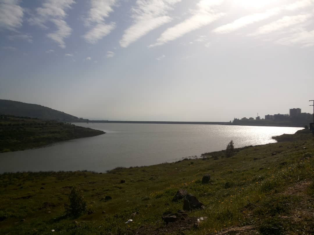 مشروع مائي في سوريا/محافظة حمص